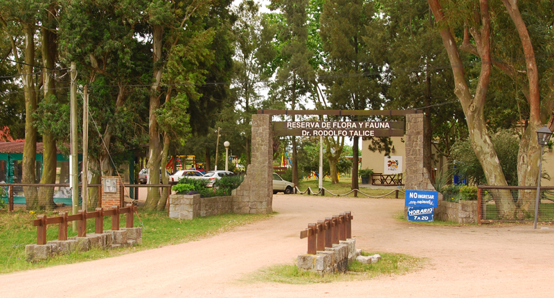 Entrada a la Reserva Talice, en la ciudad de Trinidad, Flores, Uruguay